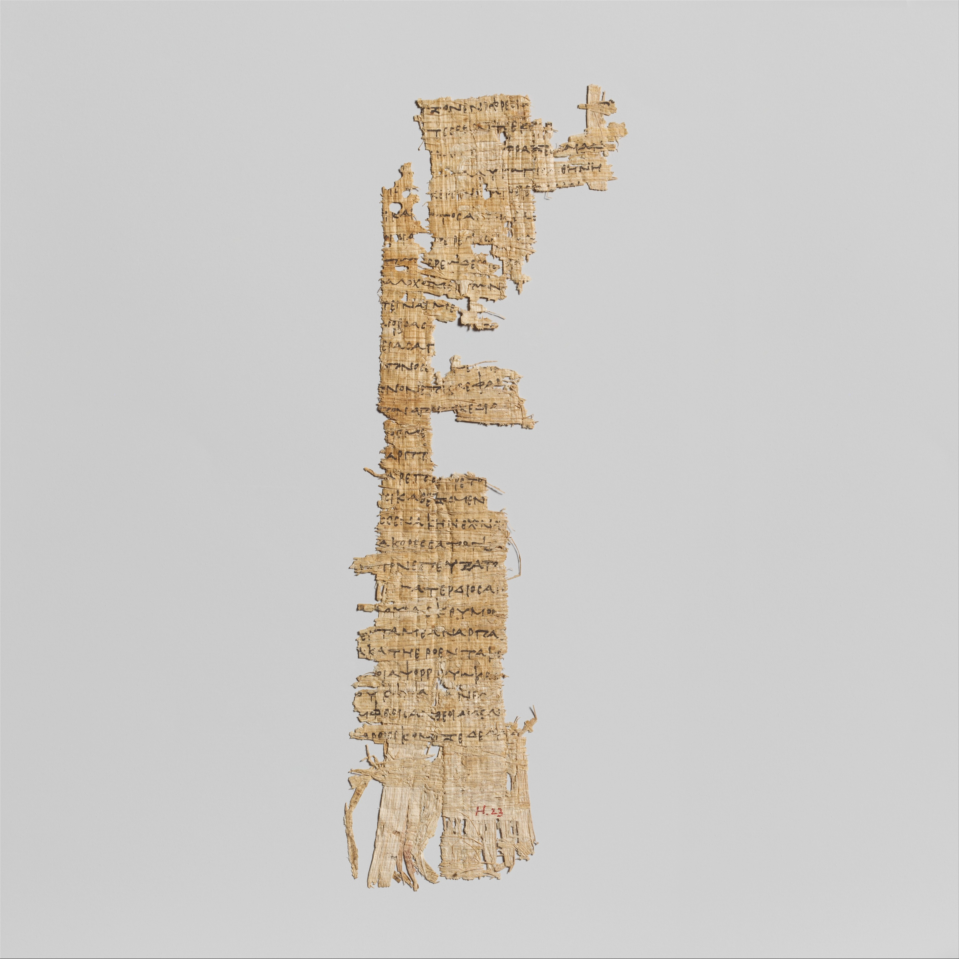 Greek, Ptolemaic; Papyrus fragment; Miscellaneous-Papyrus